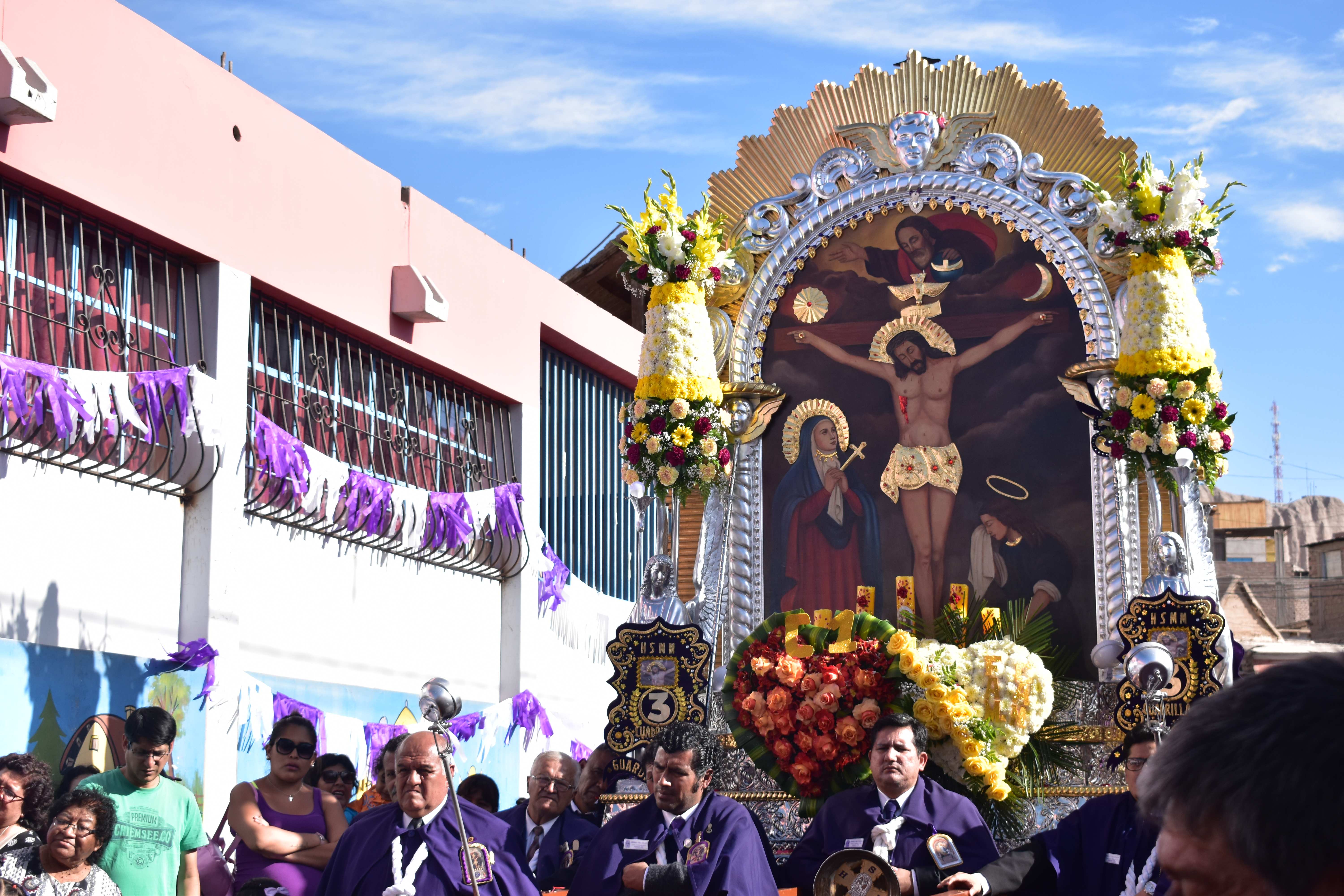 Sagrada imagen que recorre las principales calles de la ciudad.